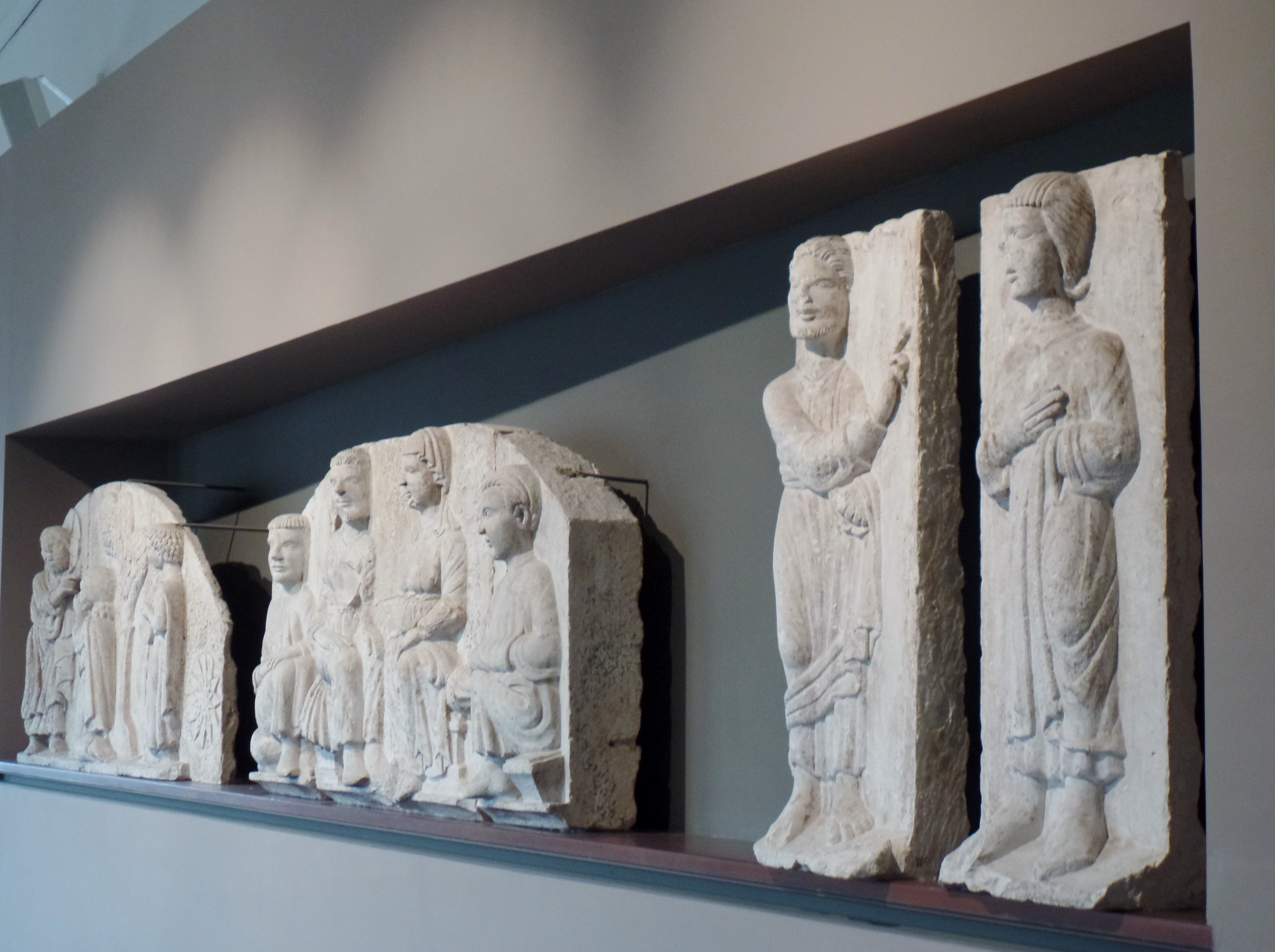 Palazzo degli Anziani Ancona serie sculture sala cerimonie This is a photo of a monument which is part of cultural heritage of Italy.